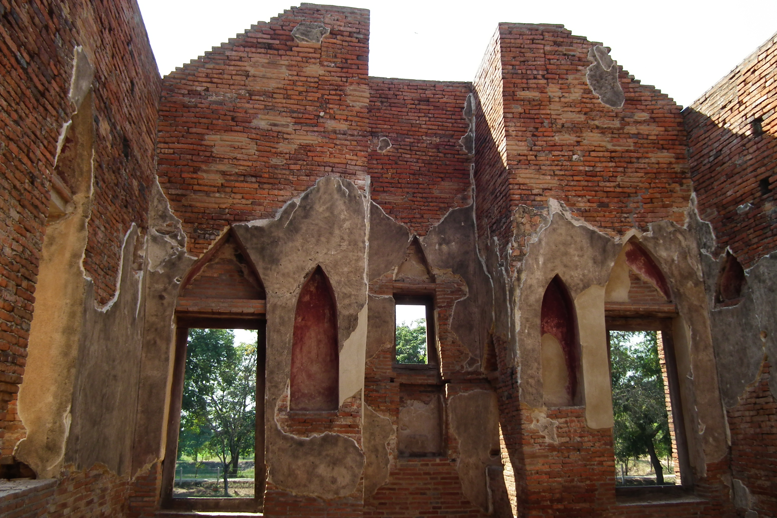 พระตำหนักคำหยาด(พระที่นั่งคำหยาด)